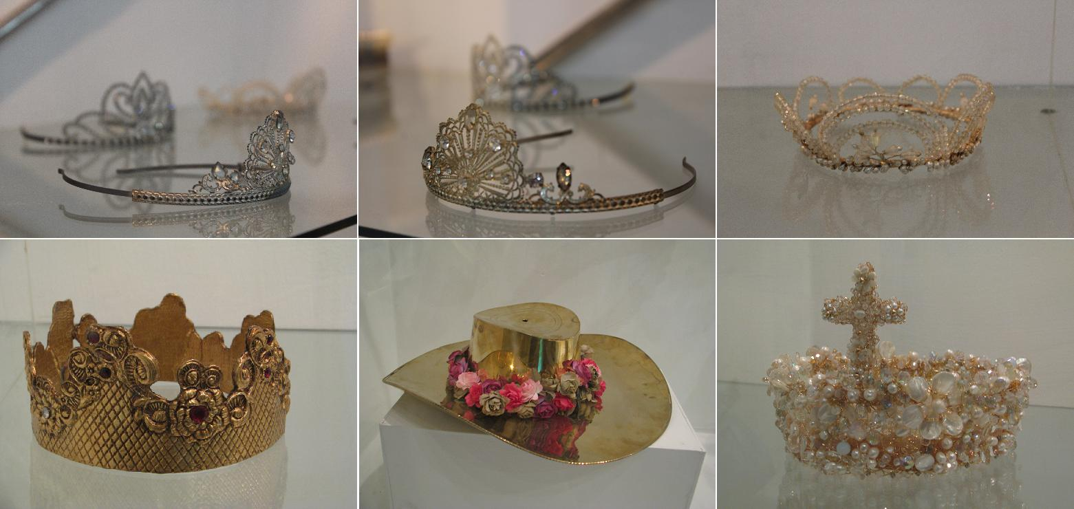 Detalles de orfebrería.